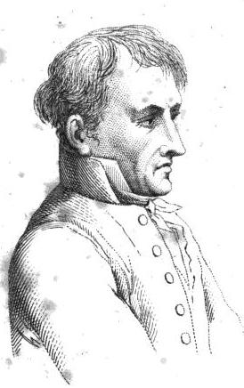 Jean-Marie de Poyferré, baron de Cère, (1768-1858).